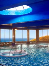 Piscinas del Centro de Talasoterapia del hotel TALASO ATLANTICO, en Oia (Pontevedra), situado en la costa gallega